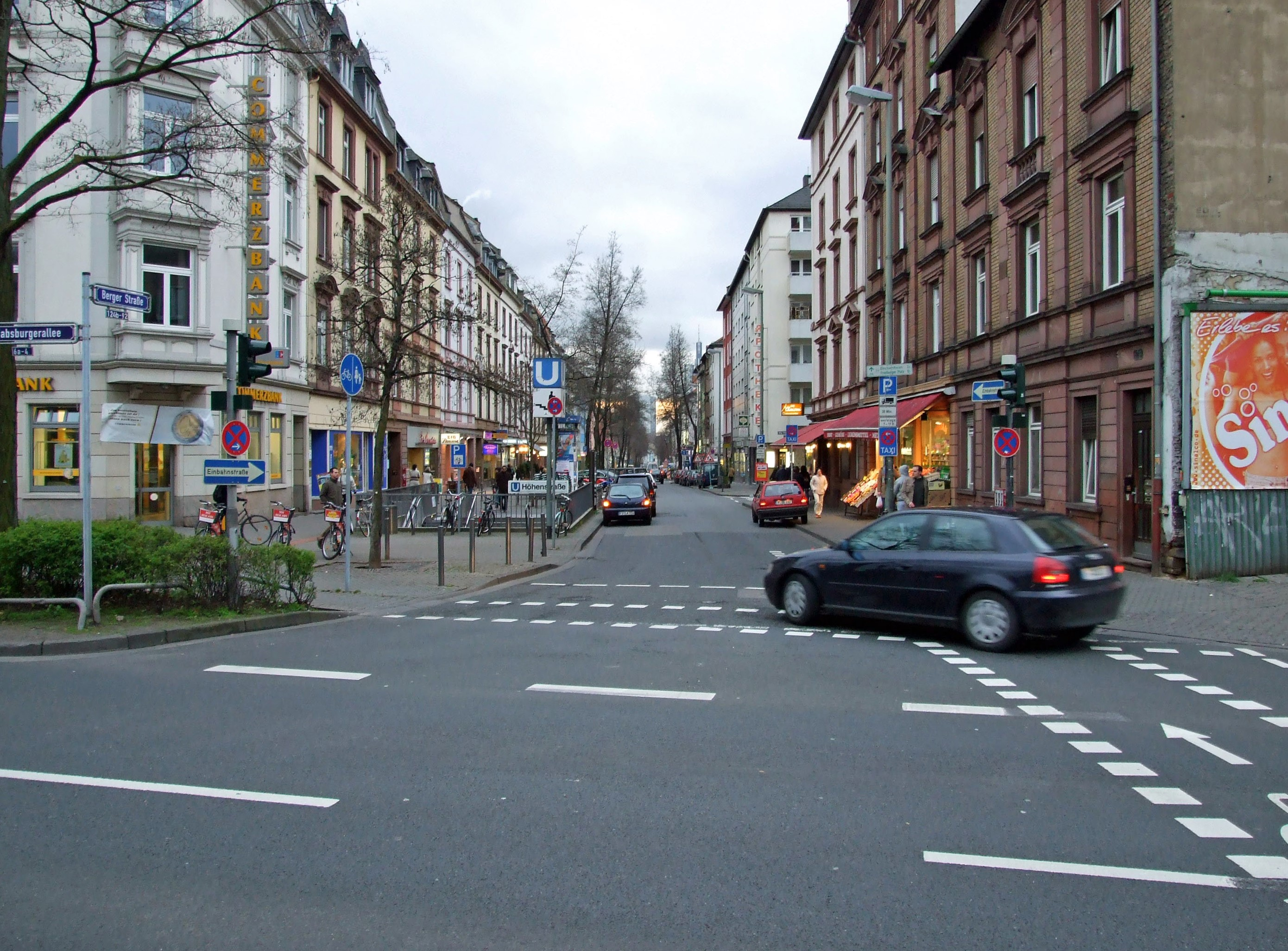 Suedliche „Berger Strasse“ an der Kreuzung Habsburger Allee/Hoehenstrasse (Richtung Sued), in Ffm